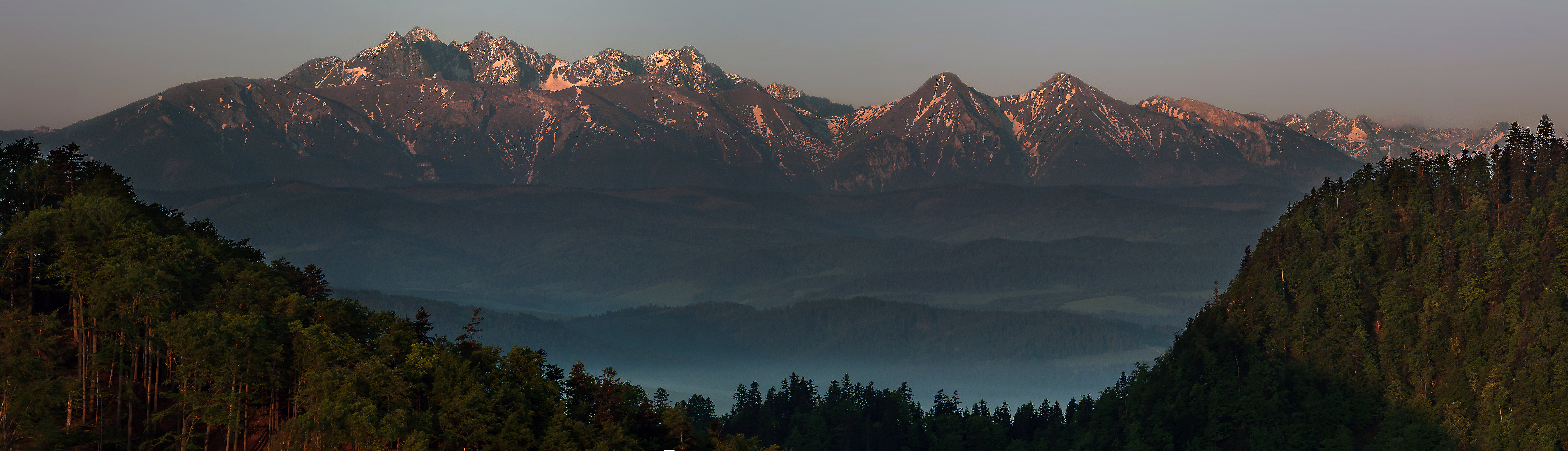 Specjalny obszar ochrony siedlisk Pieniny. Tatry widziane o brzasku z Sokolicy w Pieninach. This is a photography of Natura 2000 protected area with ID PLC120002